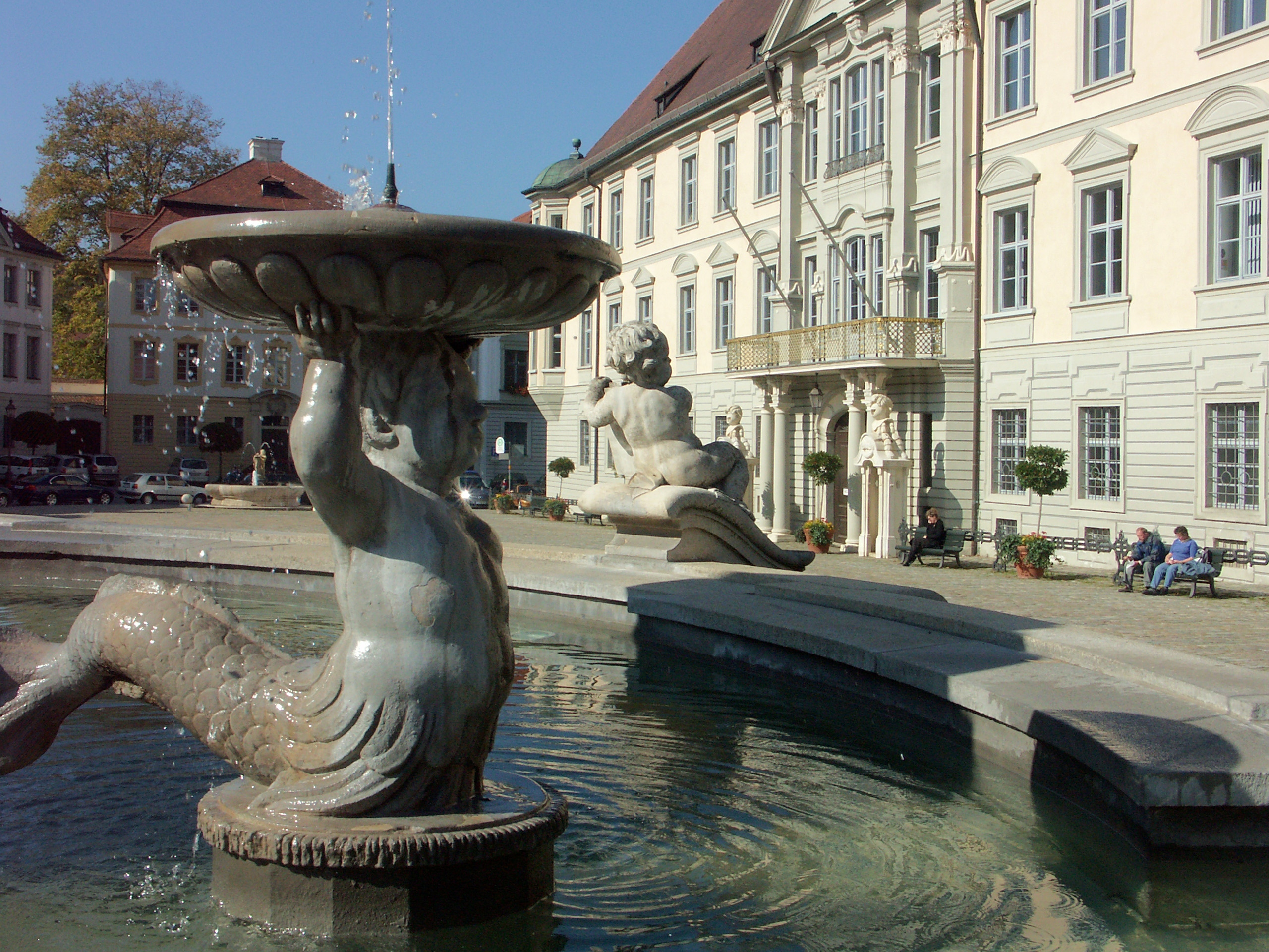 Eischstätt. Marienbrunnen mit Residenz